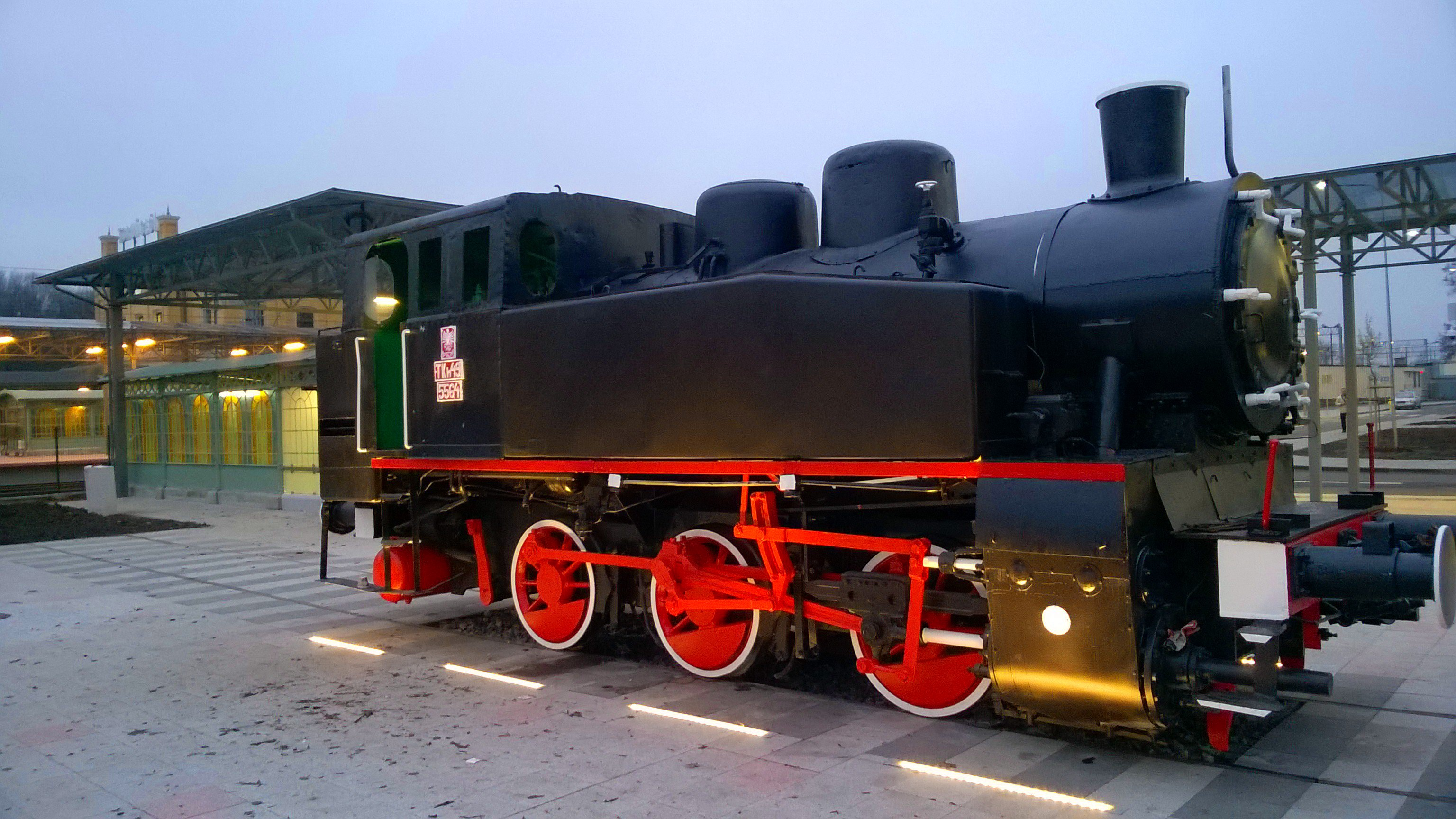 Parowóz TKh 49 - 5564 przed stacją Toruń Główny